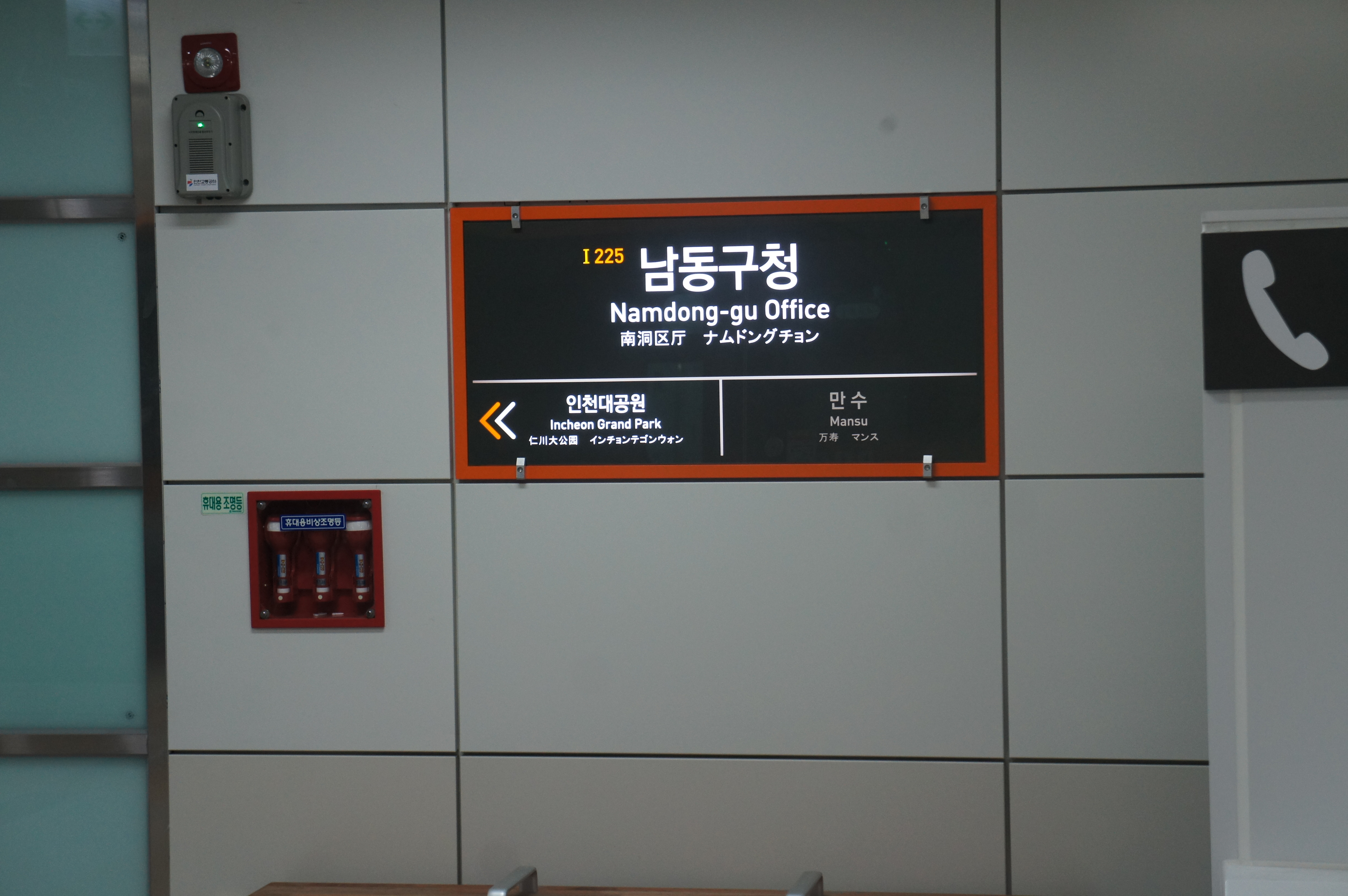 남동구청역 역명판